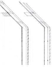 deux systèmes de pose d'un bardage sur un mur en bois, système poteau-poutre par Vahuge